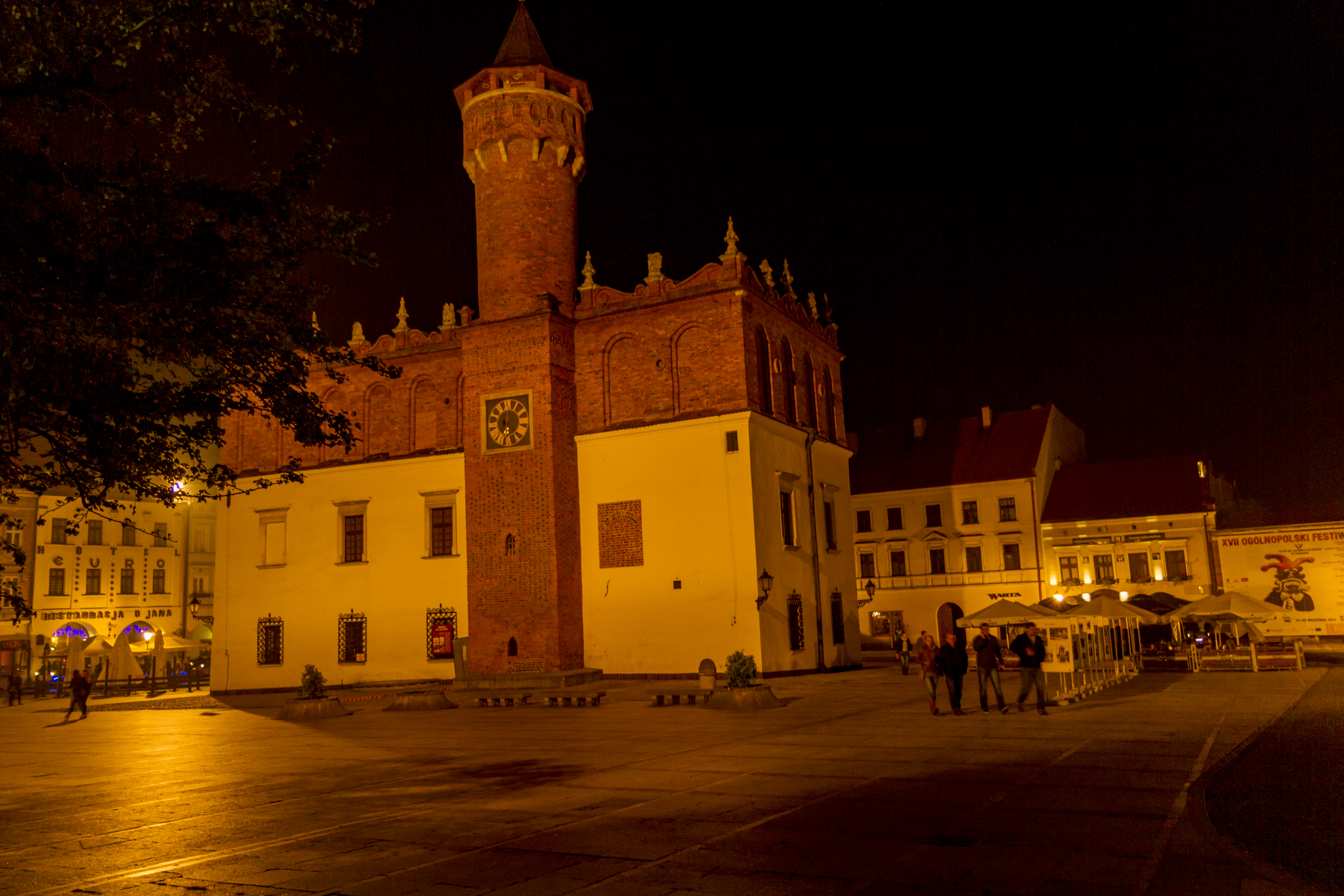 Ratusz tarnowski noca